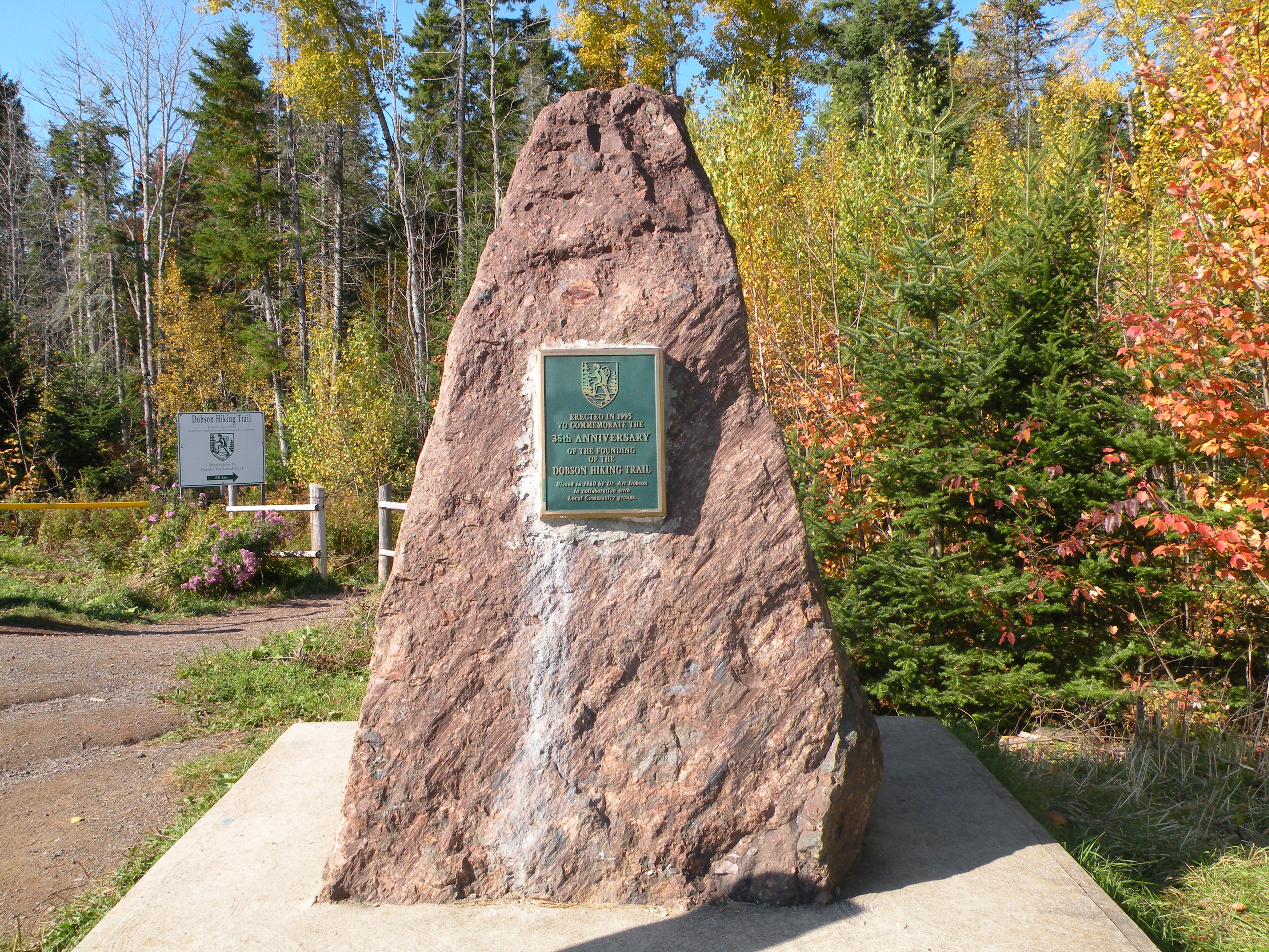 Sentier Dobson Trail